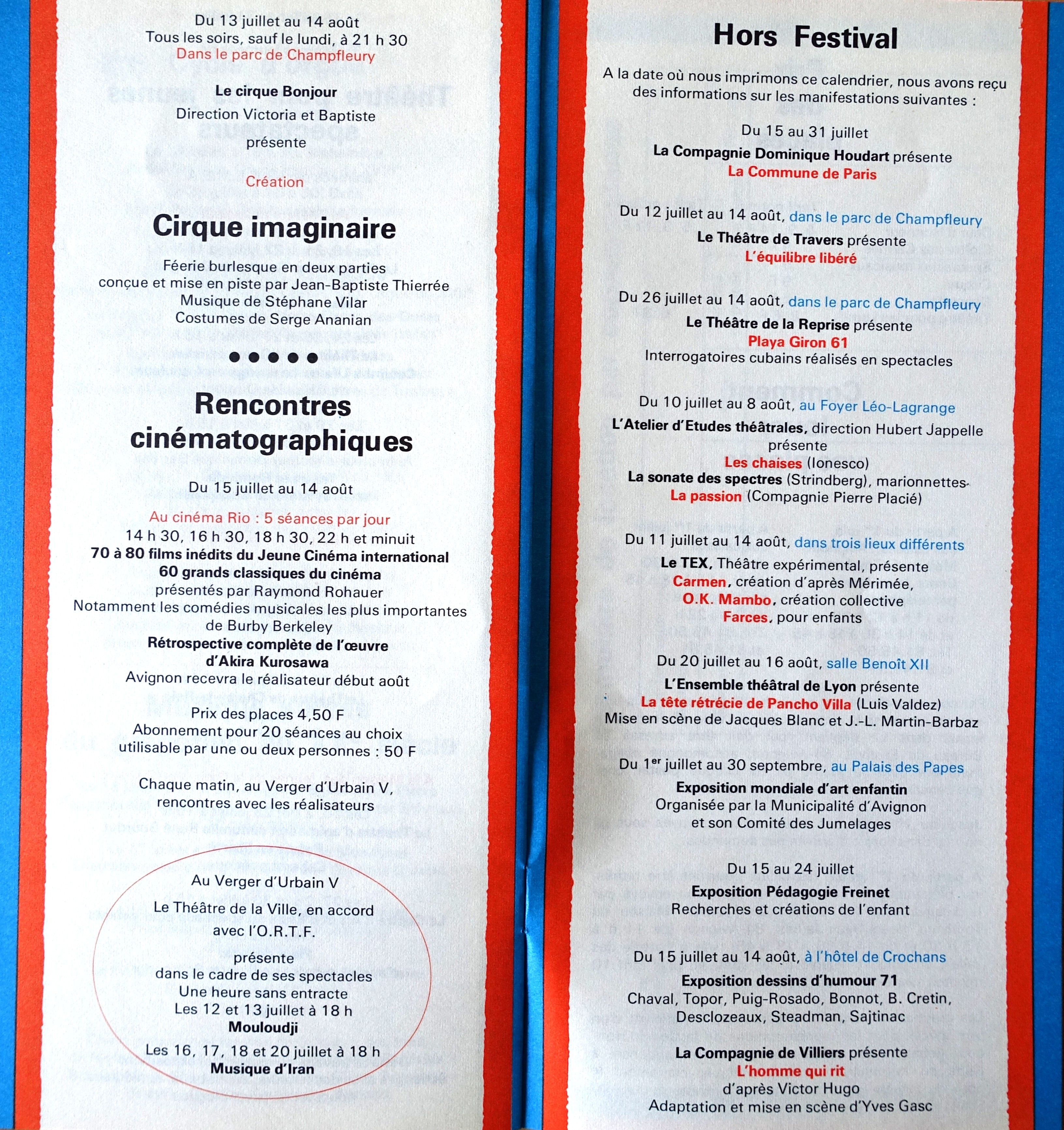 Page "Hors Festival"